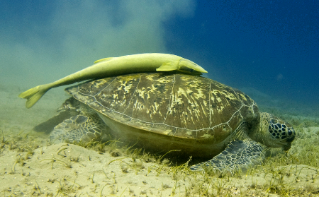 Schiffshalter auf Suppenschildkröte